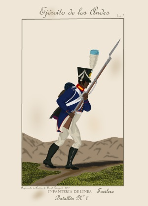 Fusilero del Batallón 7 de Infantería del Ejército de los Andes